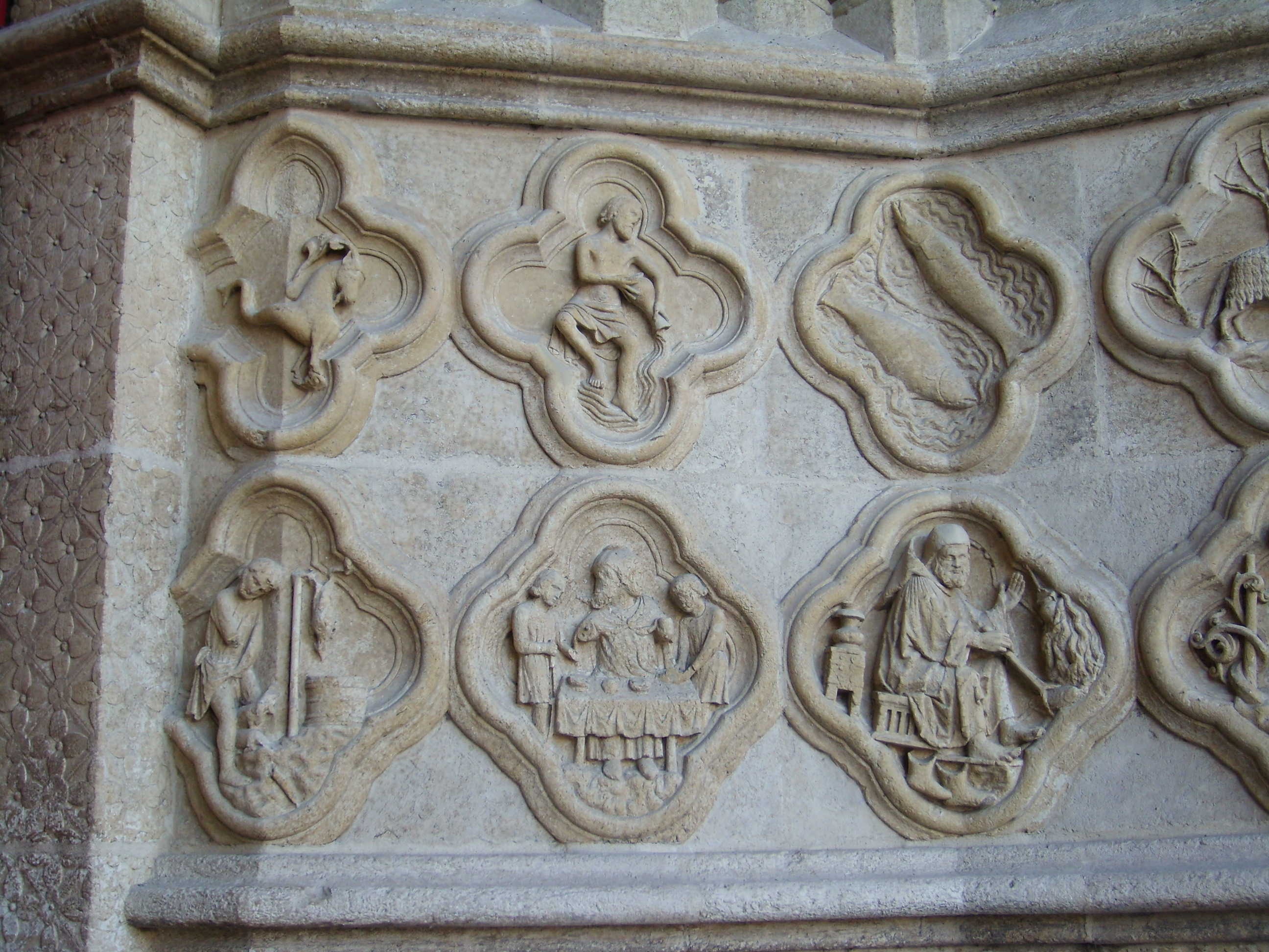 Facade de ND d'Amiens : Signes du zodiaque (Capricorne / Verseau / Poissons) et occupations agrestes